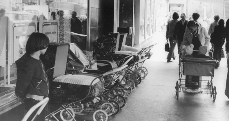 Leipzig, vorm Warenhaus am Brühl ADN-ZB Gahlbeck 15-10-74 Leipzig: "Kinderwagenparade" vor dem Konsument-Warenhaus am Leipziger Brühl. Für die Zeit des Einkaufs können die Vatis und Muttis ihre Kleinen in die Obhut von Kindergärtnerinnen geben.